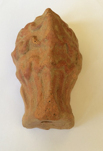 Utero votivo etrusco ritrovato nel Santuario Campestre di Tessennano presso Vulci